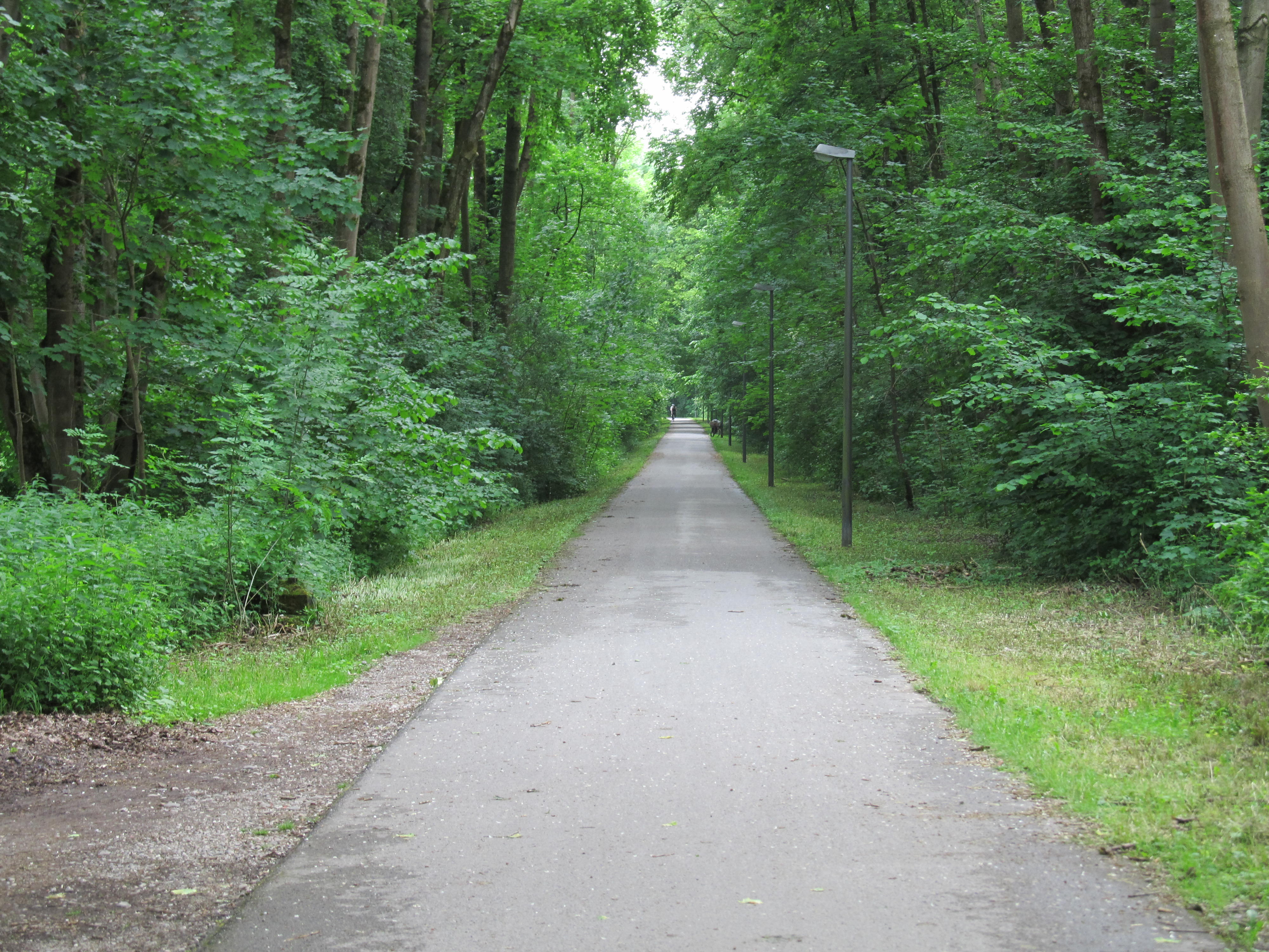 Radweg: Isartalbahnweg